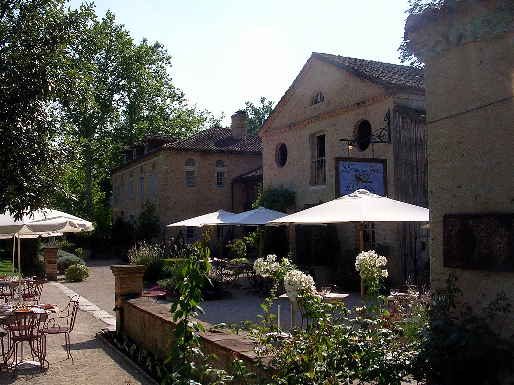 Eugénie-les-Bains (la ferme aux Grives), photo prise par Jibi44 en juillet 2006.